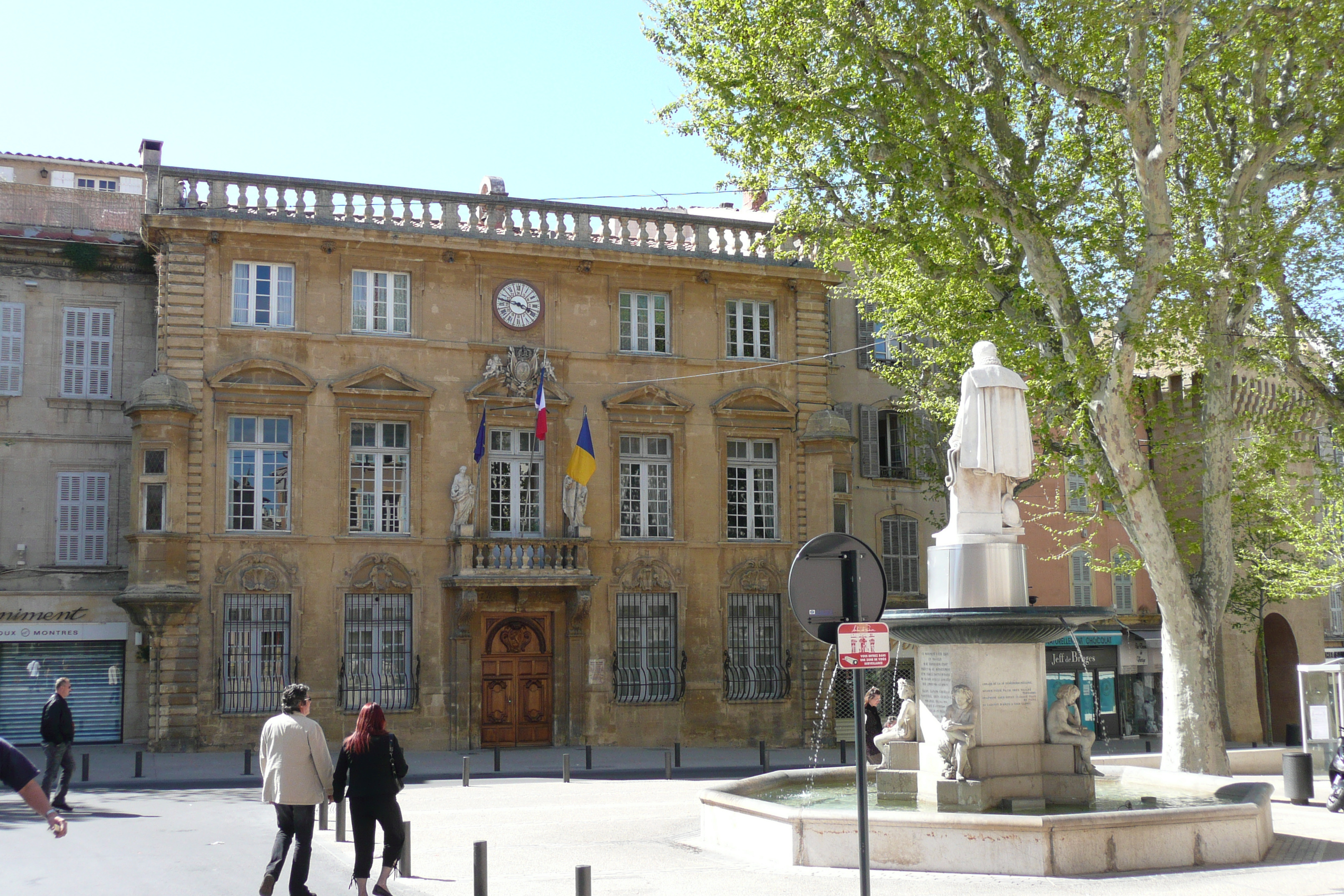 Hôtel de ville à Salon-de-Provence.